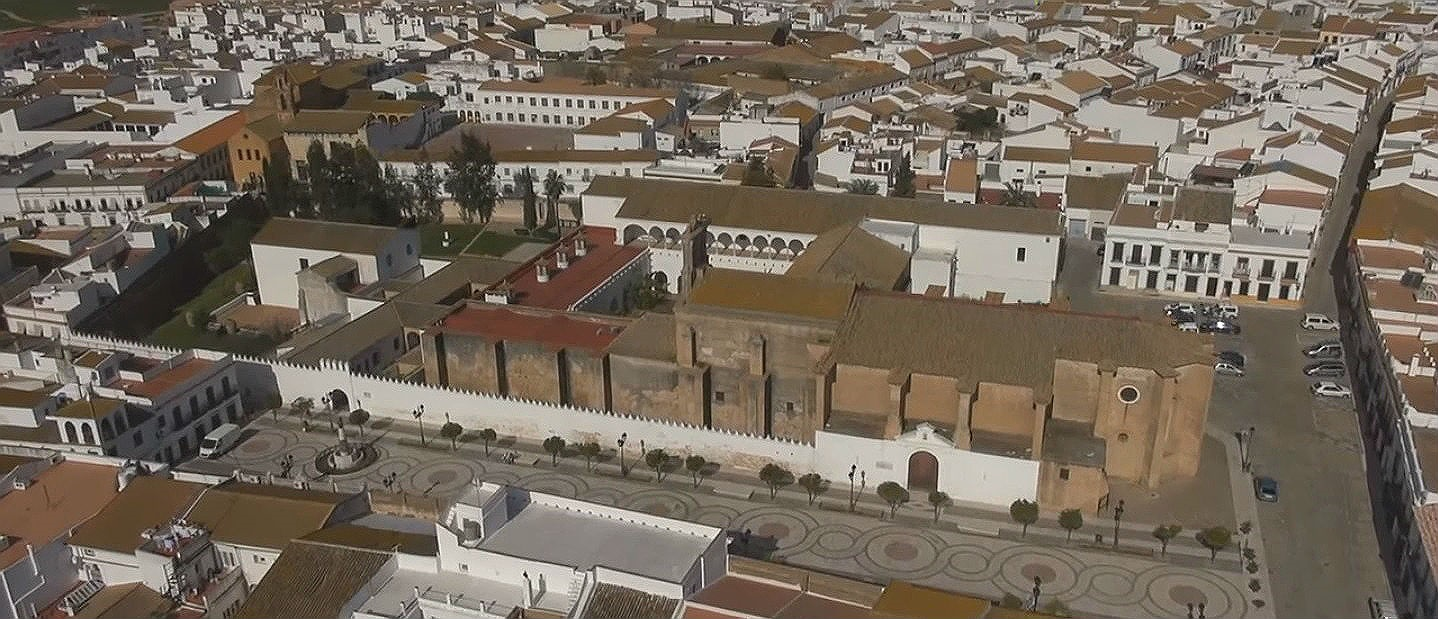 Vista desde dron del Monasterio de Santa Clara y Convento San Francisco en Moguer (España)